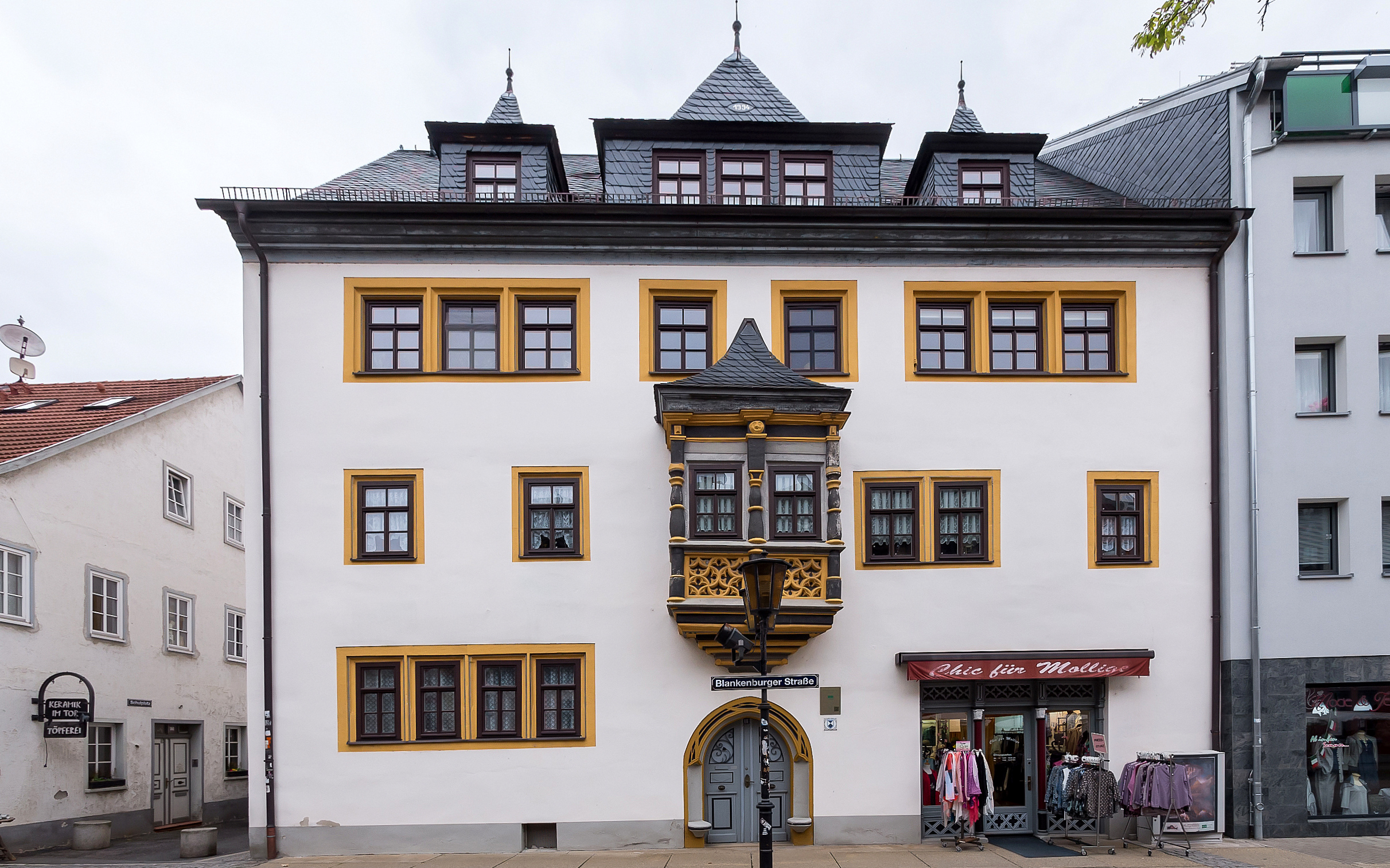 Saalfeld Blankenburger Straße 18 Hiltmannsches Haus I